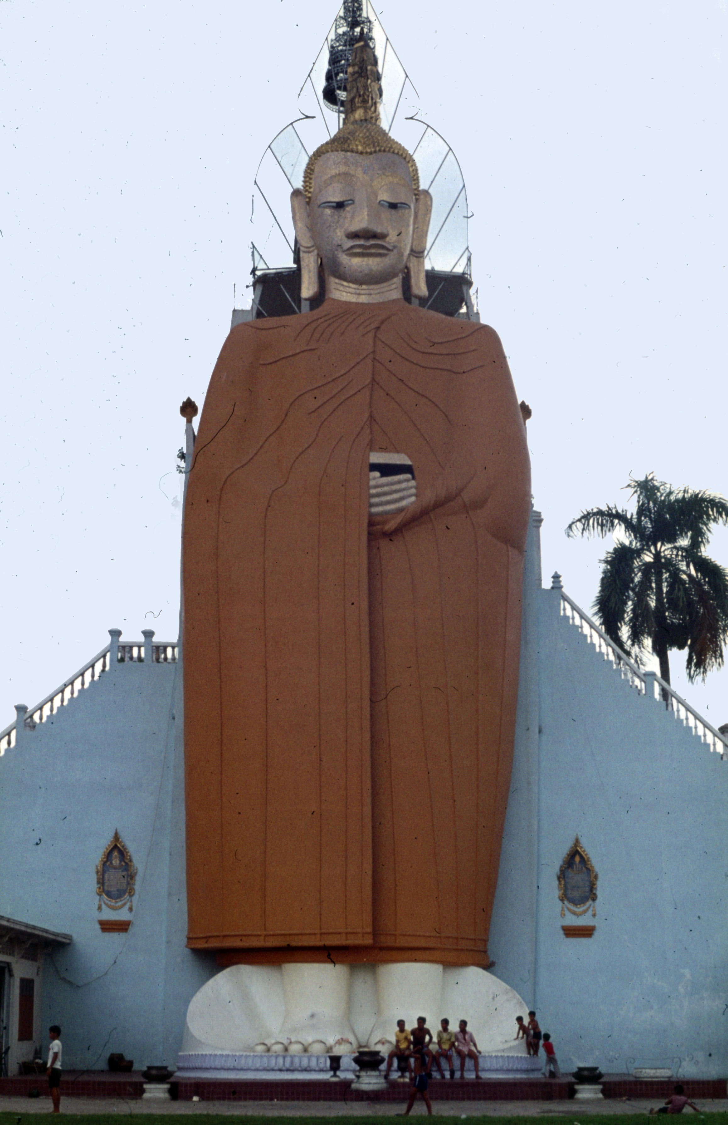 Bangkok, Wat Intharawihan, stehender Buddha, 32m hoch.